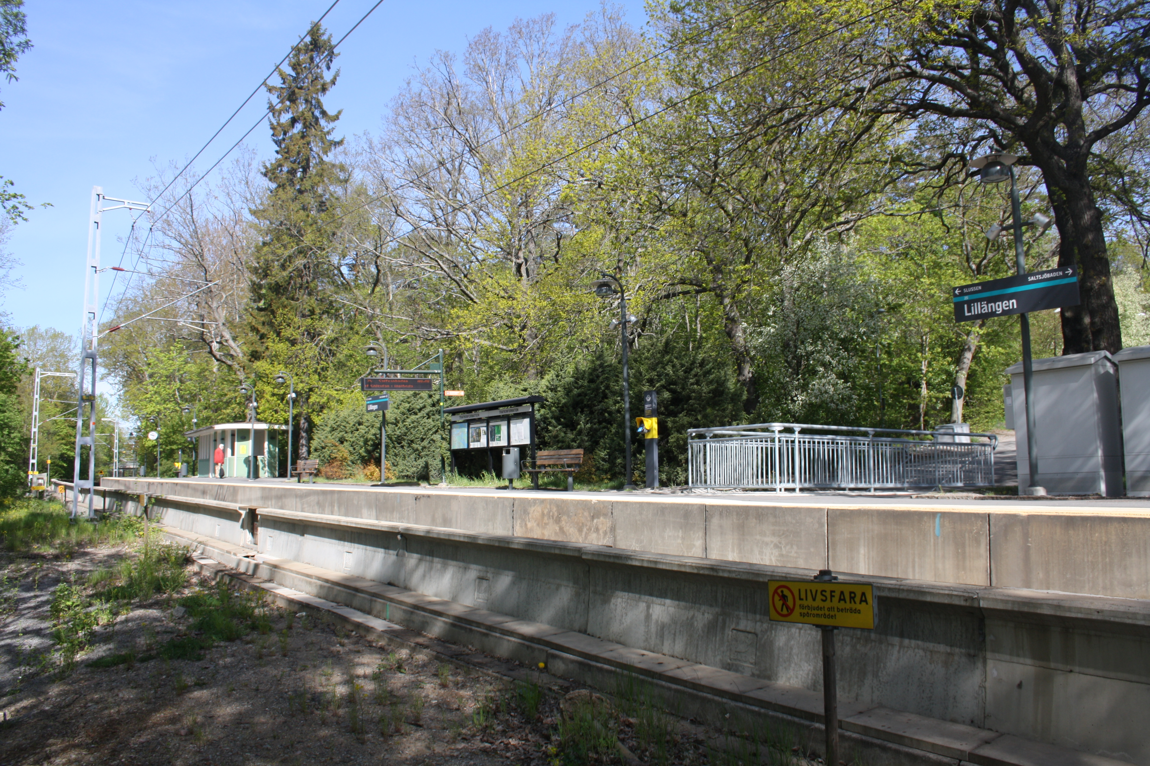 Lillängen